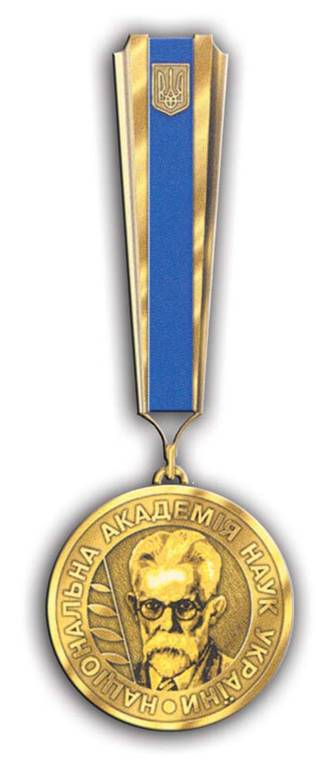 Беларуская (тарашкевіца): Залаты мэдаль імя Вярнадзкага — найвышэйшая ўзнагарода Нацыянальнай Акадэміі навук Украіны.